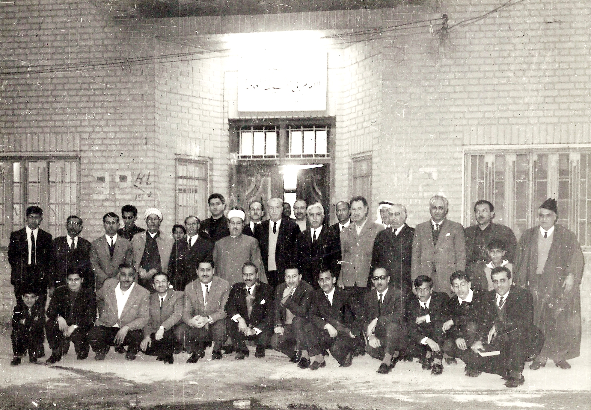 صورة أمام جمعية الامام الأعظم في مقرها القديم، قرب (قاعة القادسية) بمنطقة (النزيزة) في (الأعظمية). ويظهر في الصورة أغلب مؤسسيها الأوائل ومنهم الدكتور رشيد العبيدي الأول من اليمين جلوساً والخامس عبد الباقي جاسم من بيت المْزاينة والسابع الشاعر وليد الأعظمي والثامن الدكتور محمد محروس والعاشر عبد الملك من بيت عباس السمين أبو منذر والحادي عشر قيس حكومي والثاني عشر أخيه قُصي حكومي،، أما الواقفون فمنهم الأول من اليسار وقوفاً الفنان أحمد الشهابي والثاني الحلاق أبو عوض والرابع أشهر تاجر في الأعظمية رشيد شلال الذي يلبس الچرّاوية وخلفه ولده صباح والسادس ملَّه حسين الذس يلبس الفينة والتاسع الأستاذ نوري الأعظمي والحادي عشر مؤذن جامع الإمام الأعظم ثابت الأعظمي أبو سعدي والثالث عشر ناجي المُلا ياس الأعظمي وخلفهم يقف من اليمين الذس يلبس العقال إبراهيم الكتبي أبو مؤيد والثاني ابراهيم البلوة ، وهذه الجمعية هي جمعية إسلامية خيرية أسسها مجموعة من علماء وأدباء الأعظمية عام 1960م